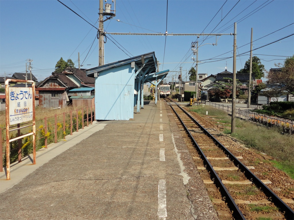 富山地方鉄道本線経田駅ホーム